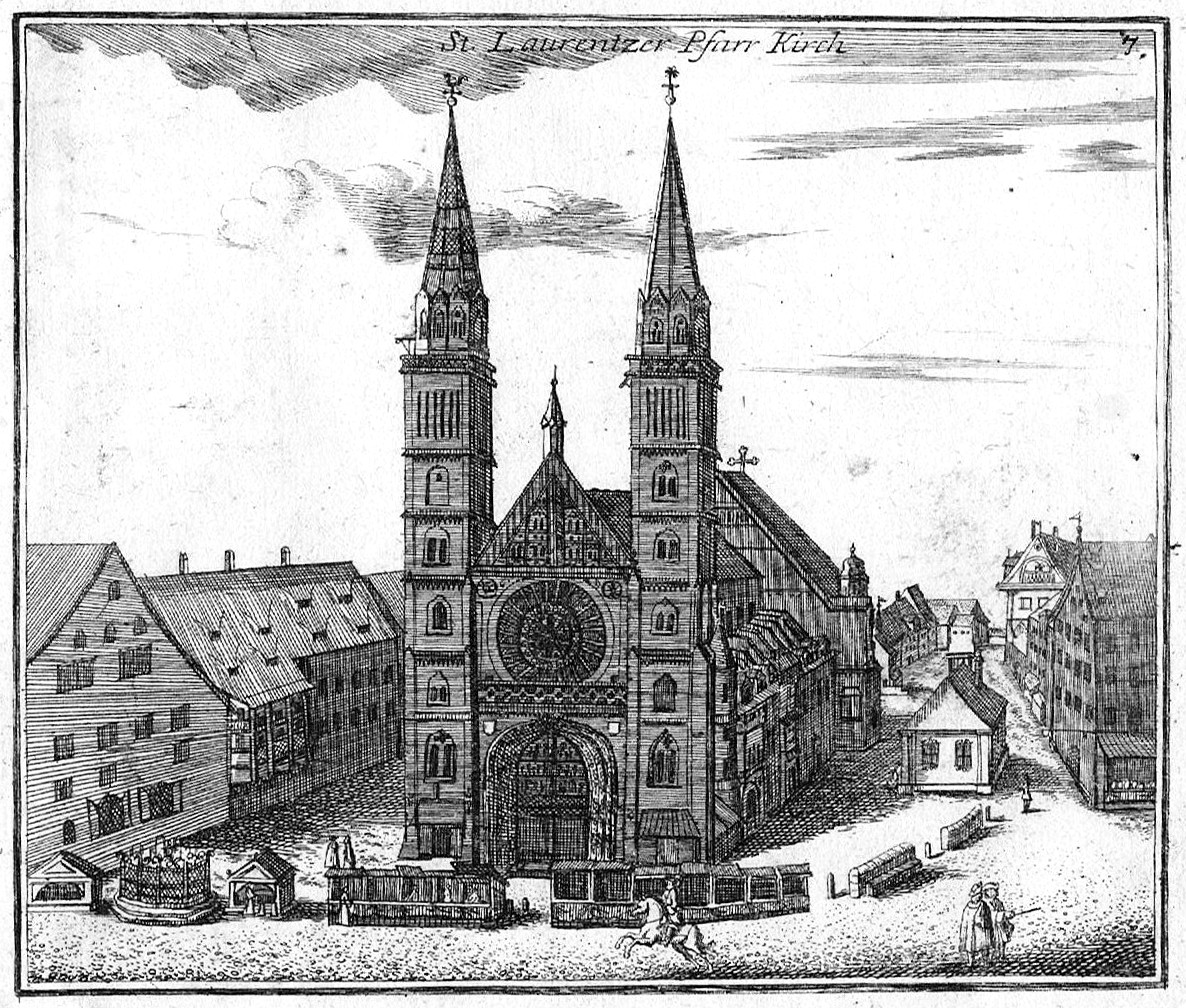 St. Laurentzer Pfarr Kirch in Nürnberg. Kupferstich von Samuel Mikovíny aus Nürnbergische Prospecte, herausgegeben von Peter Conrad Monath, um 1720